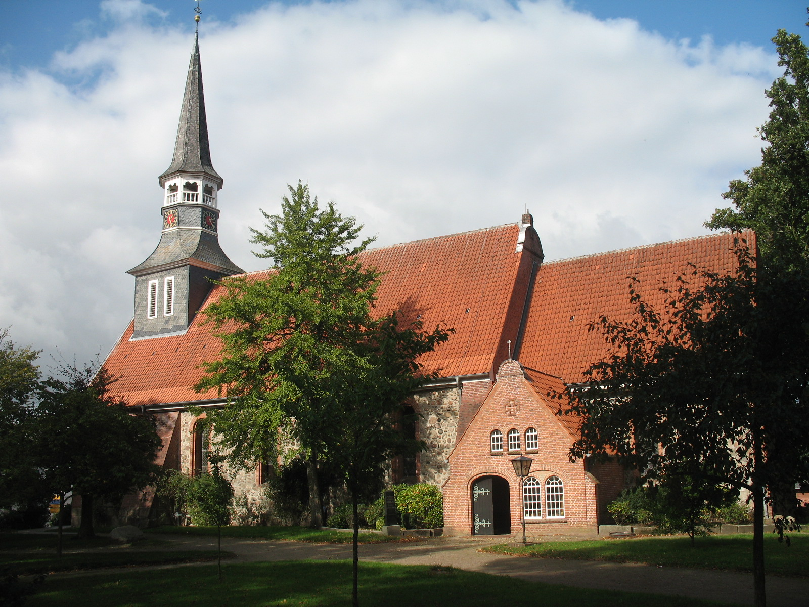 Die Kirche wurde vom Bremer Bischof Willerich um 825 erbaut.